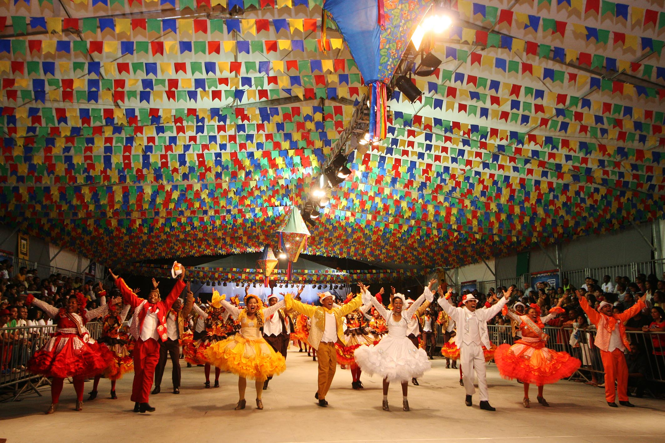 Abertura do São João 2011 no Pelourinho, com concurso de quadrilhas juninas, shows de Gilberto Gil e Targino Gondin.. Foto: Mateus Pereira/Secom